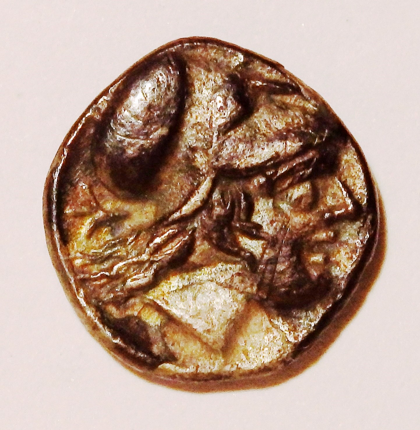 Rückseite dieser Halbdrachme, Athenakopf mit korinthischem Helm, Szaivert/Sear 3866